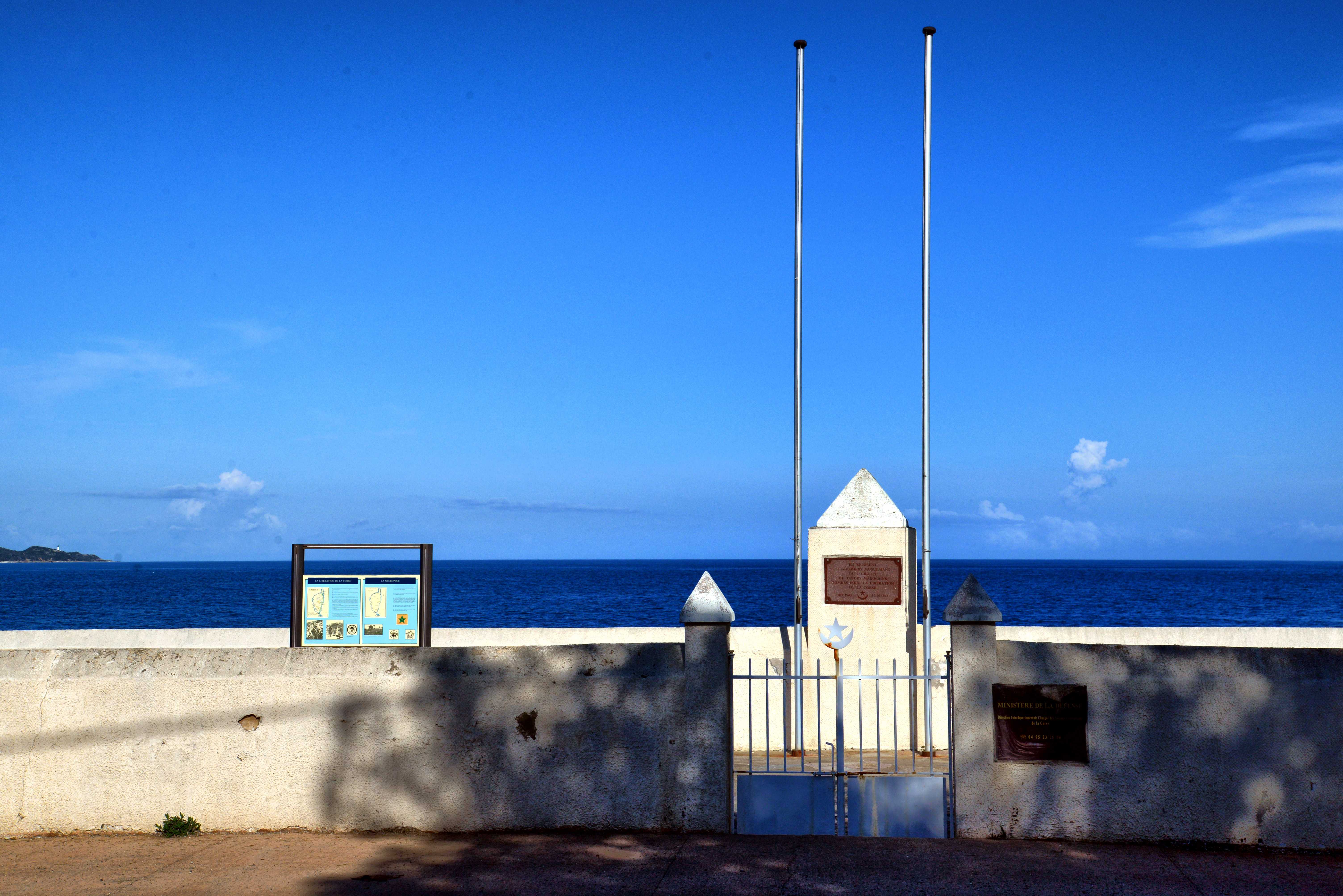 Saint-Florent, Nebbio (Corse) - Nécropole nationale des Tabors (Tombes de 10 Goumiers musulmans du 2e groupe de Tabors marocains, tombés pour la Libération de la Corse entre les 10/09/1942 et 30/10/1943)